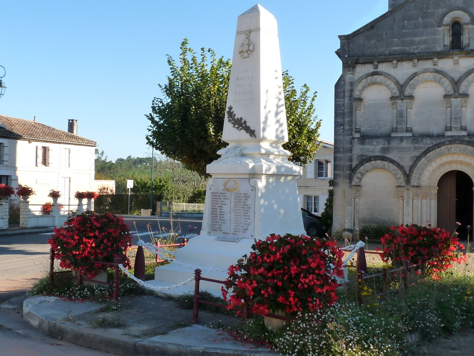 Monument aux morts, Saint-Martin-de-Coux, Charente-Maritime, France